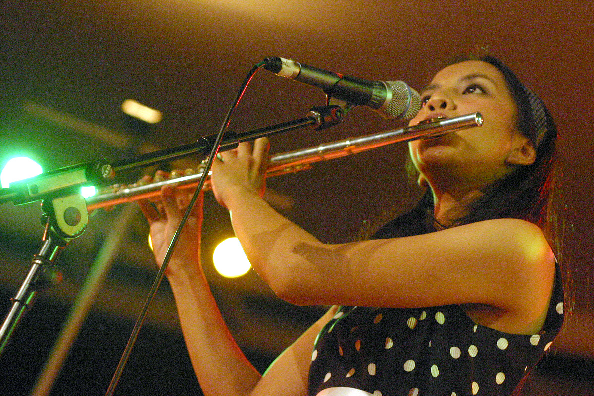 Mocca Concert 4 February 2005 in Esplanade, Singapore